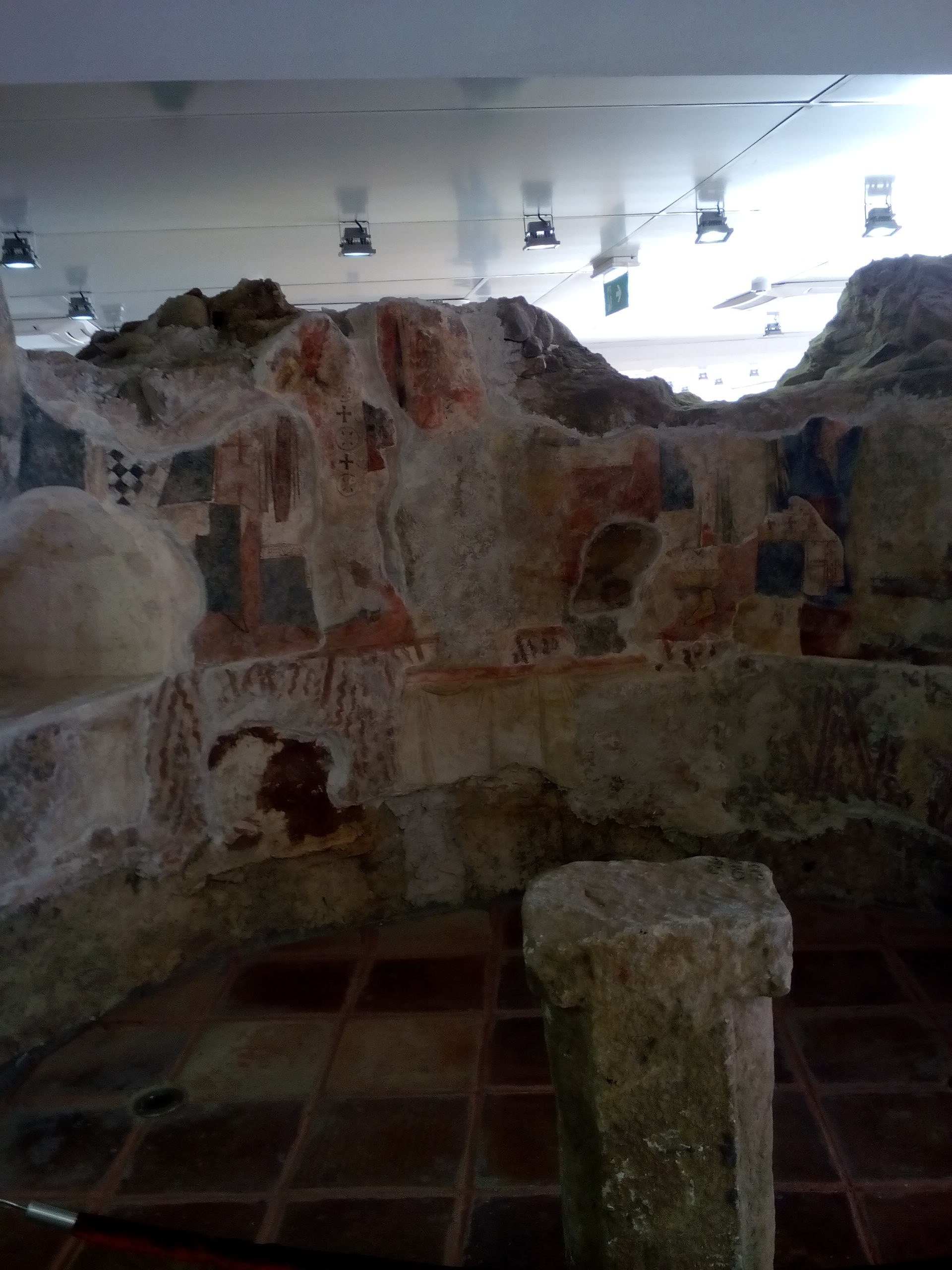 малка еднокорабна църква (16-19в)